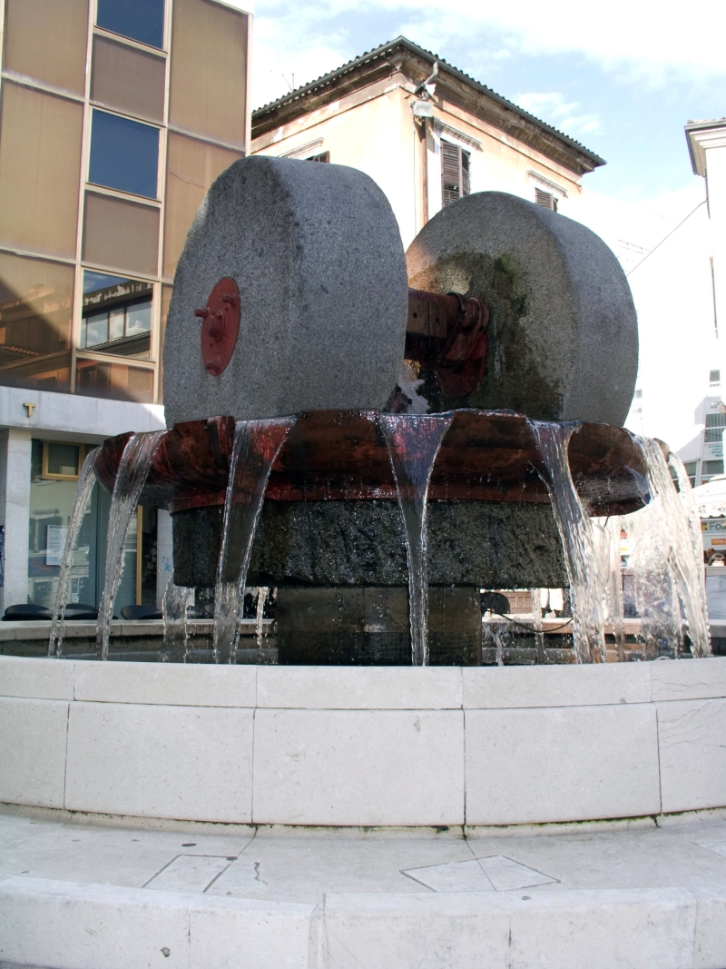 Fontana na Koblerovom trgu, Rijeka. Podignuta je 1974. godine u povodu obilježvanja 150. obljetnice postojanja Tvornice papira. Od dijela starog tvorničkog mlina za mljevenje papira arhitekt Igor Emili izradio je izvorno djelo gdje je "sredstvo rada postalo sredstvo radosti", kako stoji na memorijalnom natpisu.